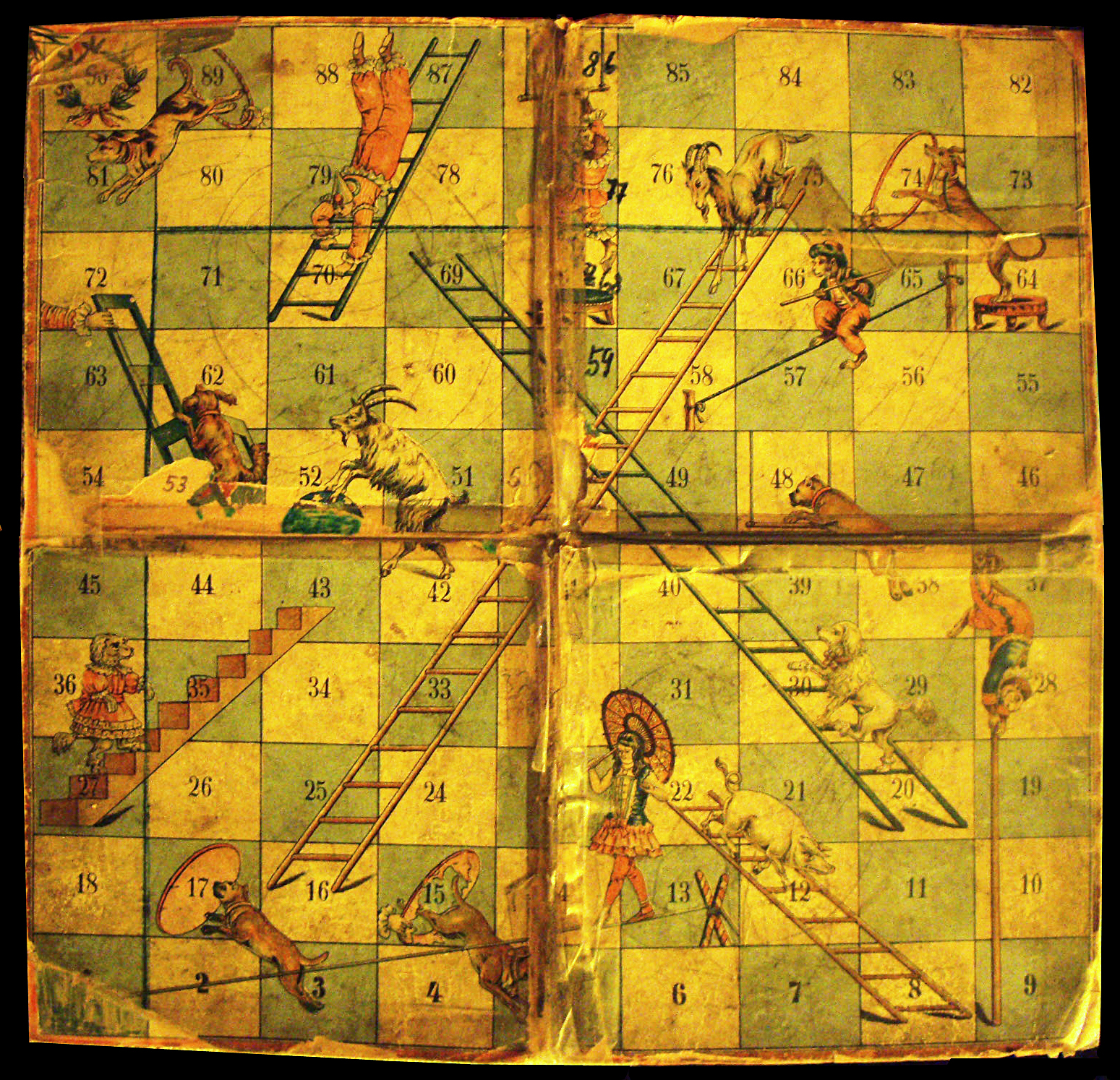 Leiterspiel, vermutlich Ausgabe Spear & Söhne von 1920 mit Zirkusmotiven. Ziemlich ramponiert, Aufnahme von 2013, Privatbesitz, Oerie bei Hannover, zu dieser Zeit immer noch in Benutzung. Foto: Francisco Welter-Schultes.